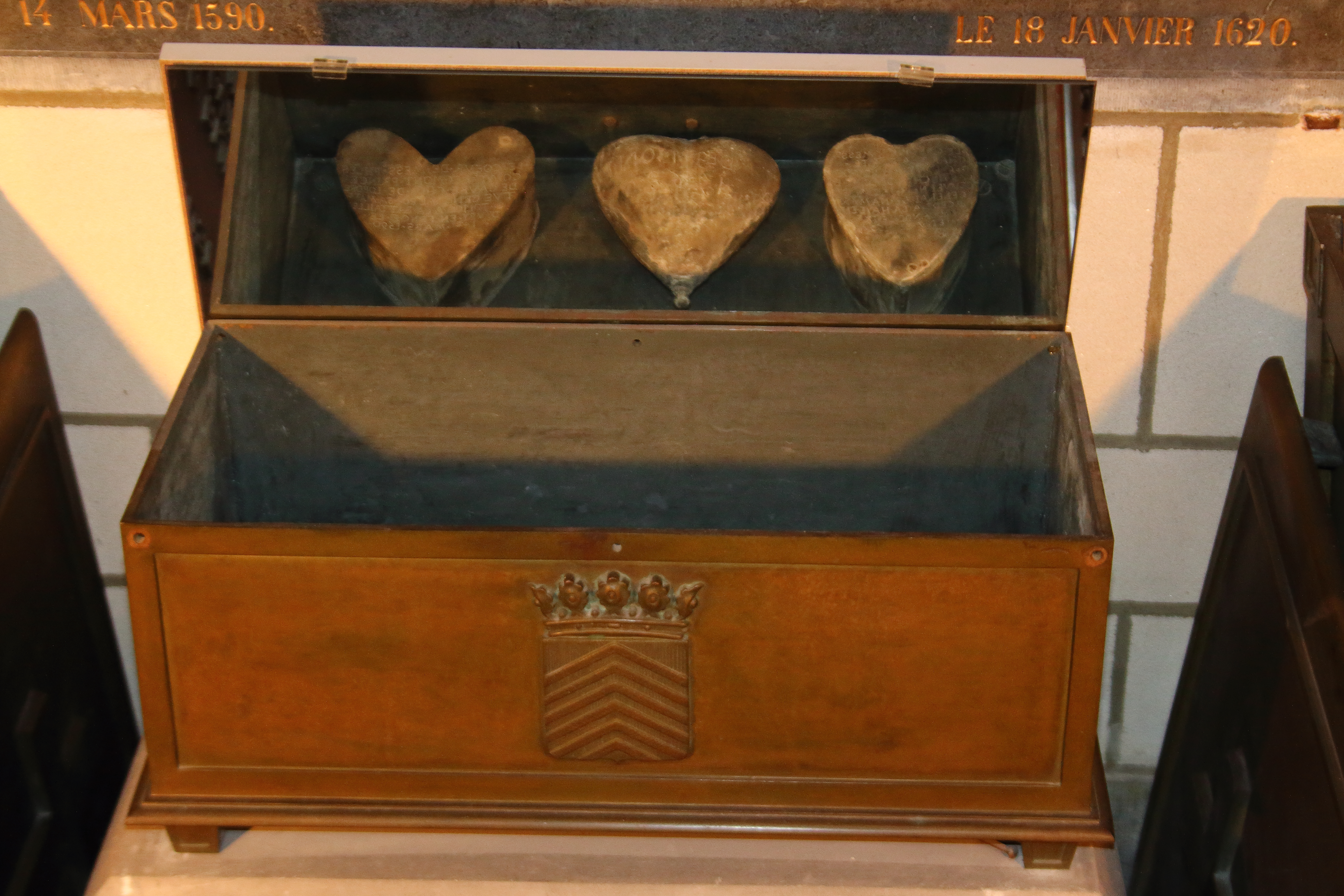 Egmontcrypte, Zottegem, Vlaanderen, België